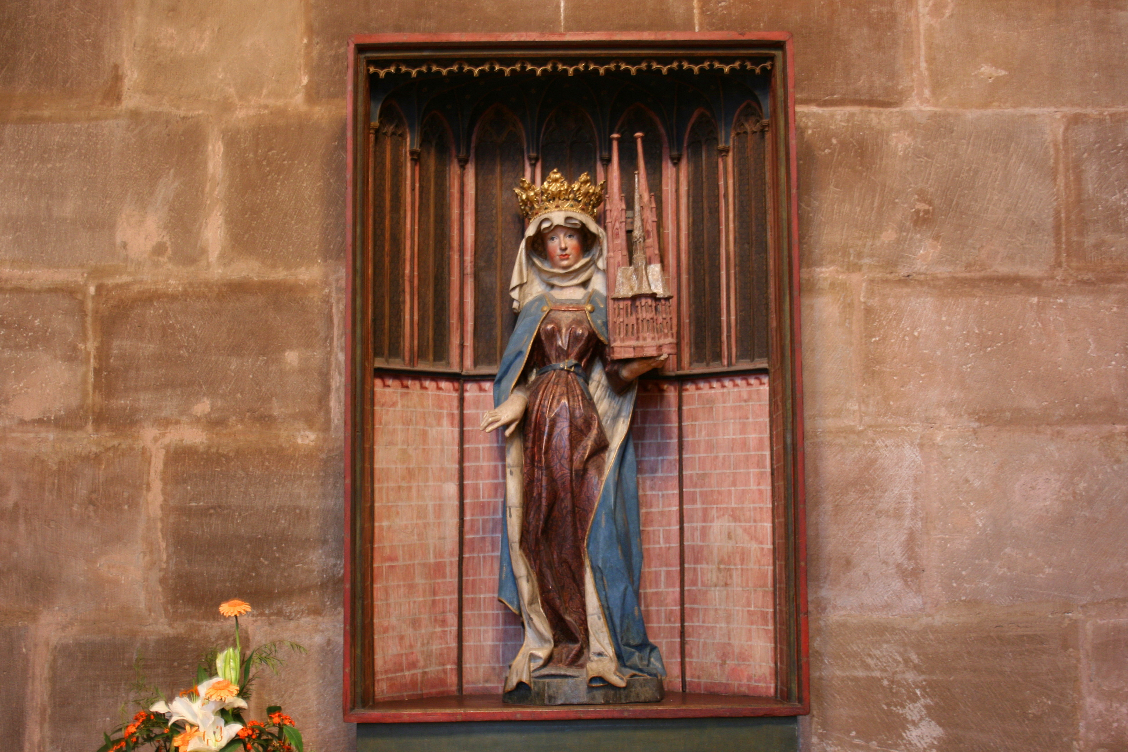 Elisabethkirche in Marburg